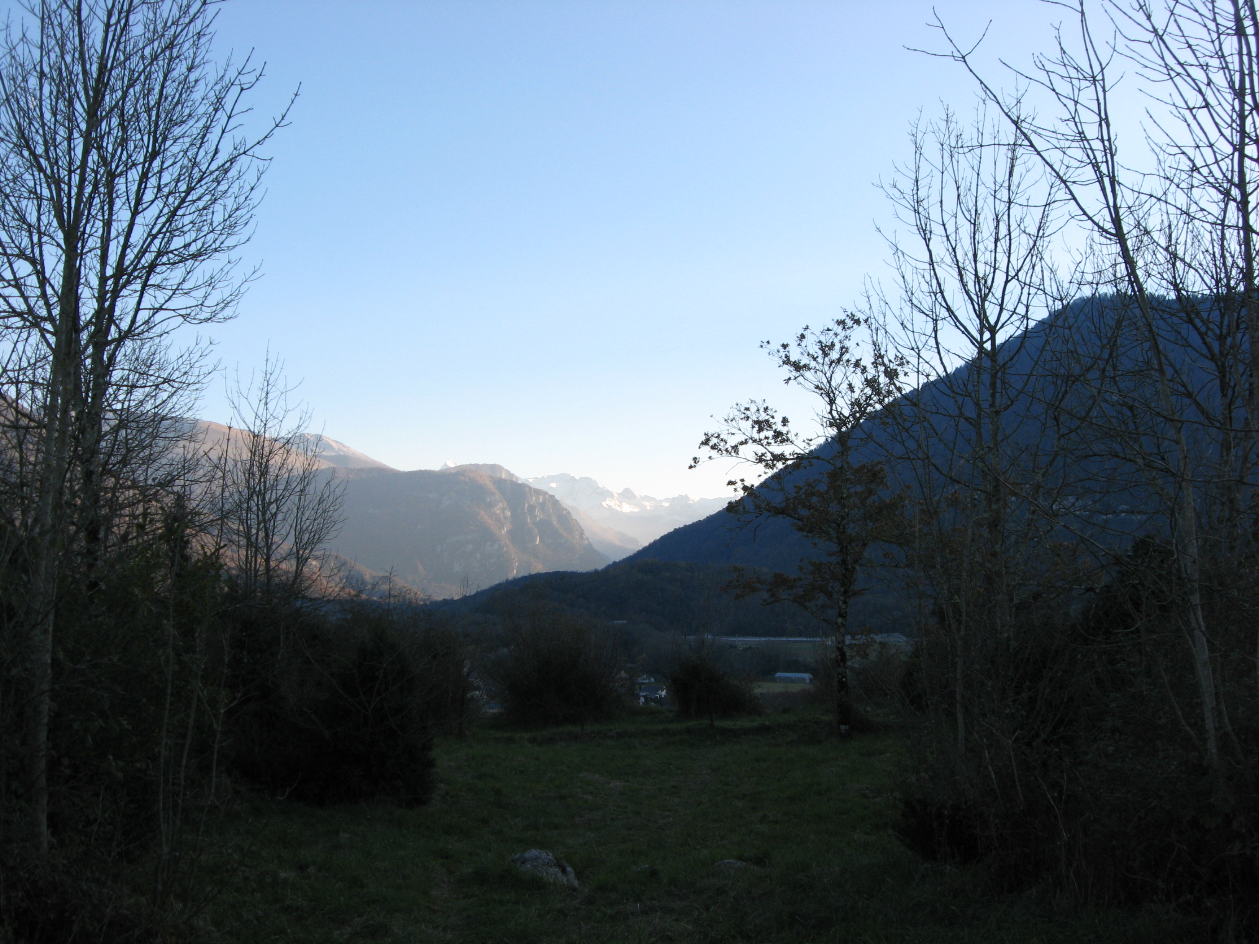 Vallée d'Ossau depuis le promontoire d'Arudy (Pyrénées-Atlantiques) (Pyrénées).